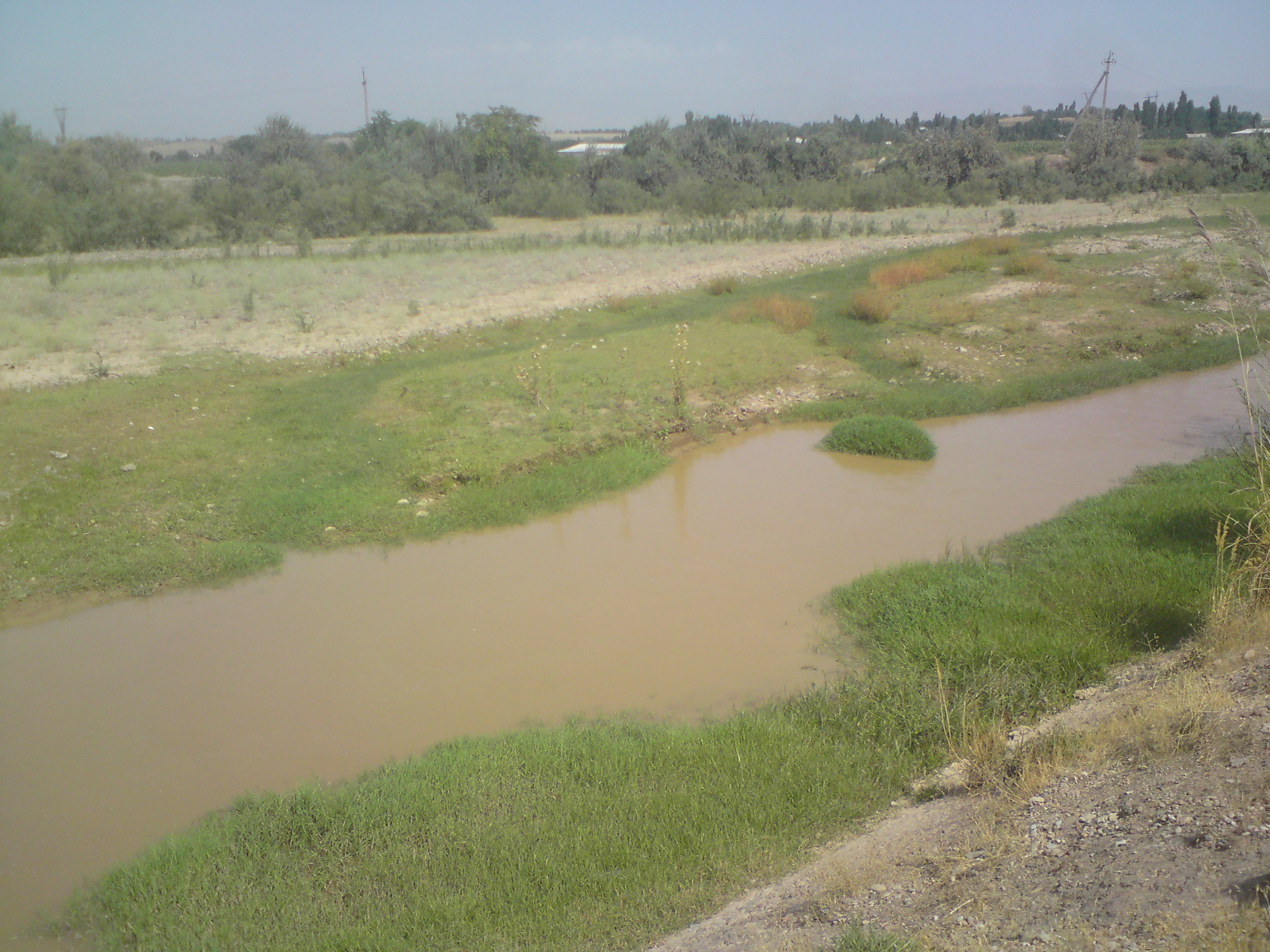 Река (сай) Кызылсай, приток Левобережного Карасу в августе (маловодный период). Недалеко от впаления, кишлак Сасбака, Юкарычирчикский район, Ташкентский вилоят, Узбекистан